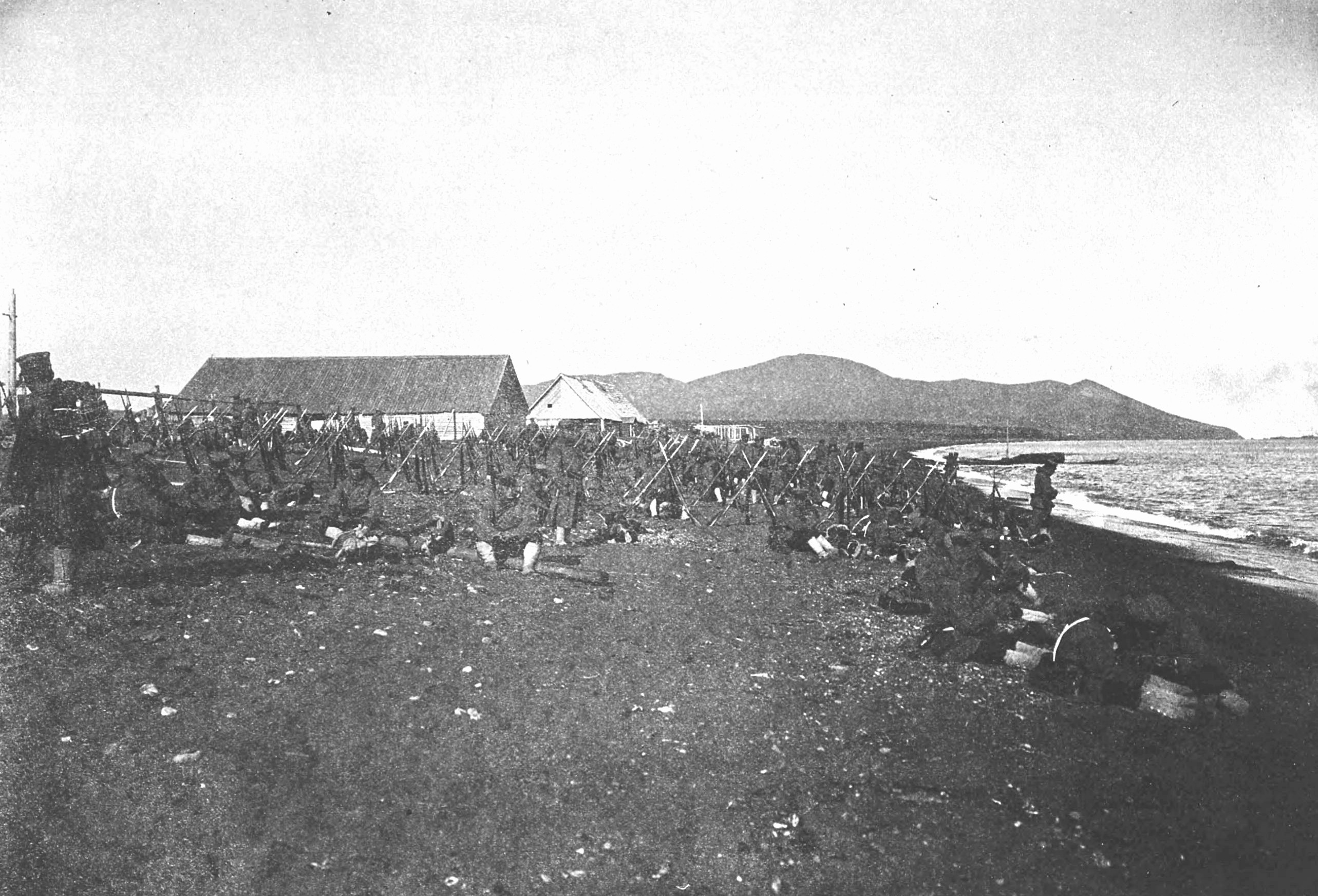 樺太のメレヤ村にて休憩する歩兵第50連隊